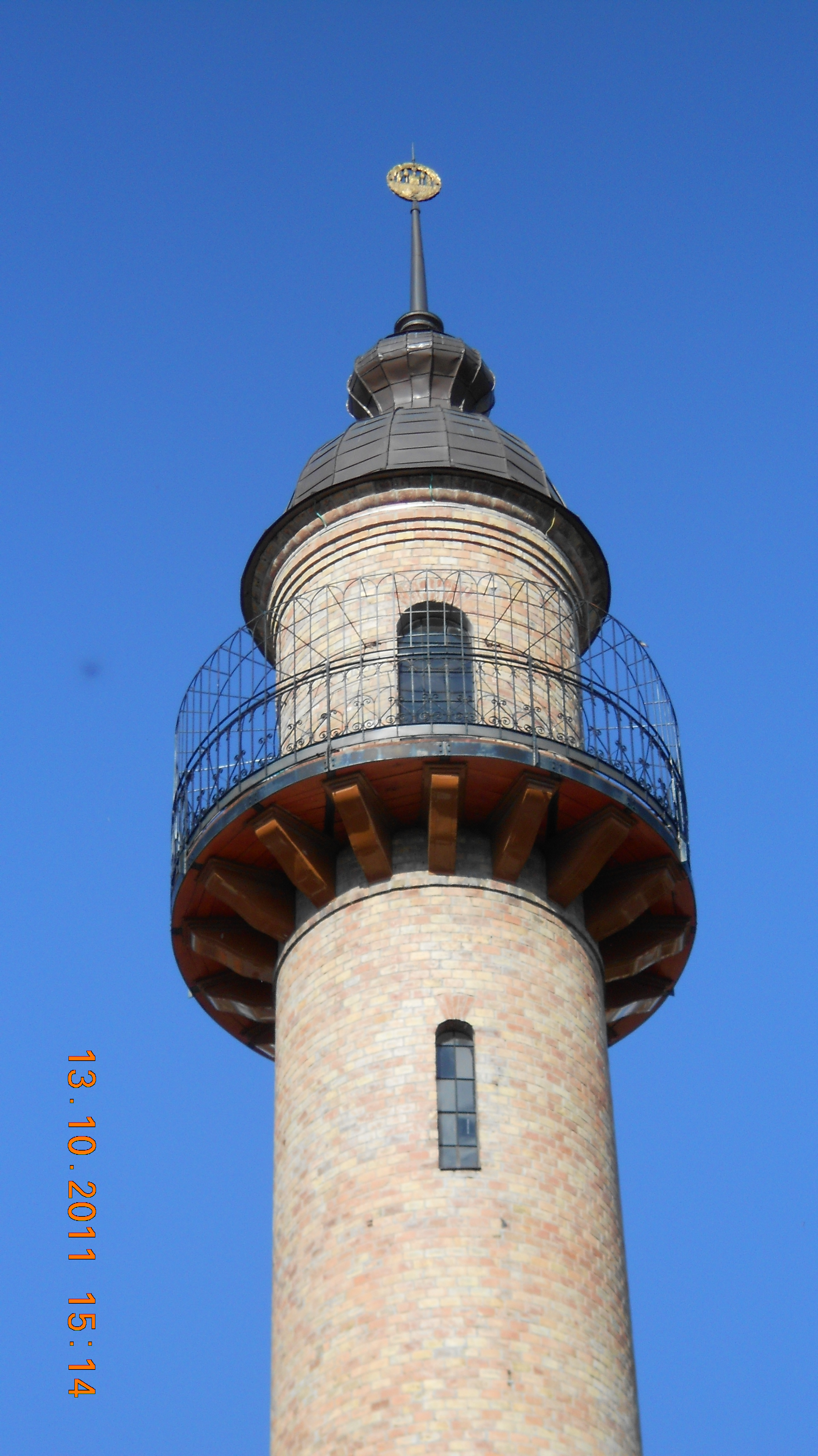 Constructorul turnului a fost Vainay Ludovic. Astăzi este un simbol al oraşului vechi. Restaurarea turnului a fost terminată în anul 2005, când cu ocazia zilei pompierilor la 13 septembrie acesta a putut fi vizitat.